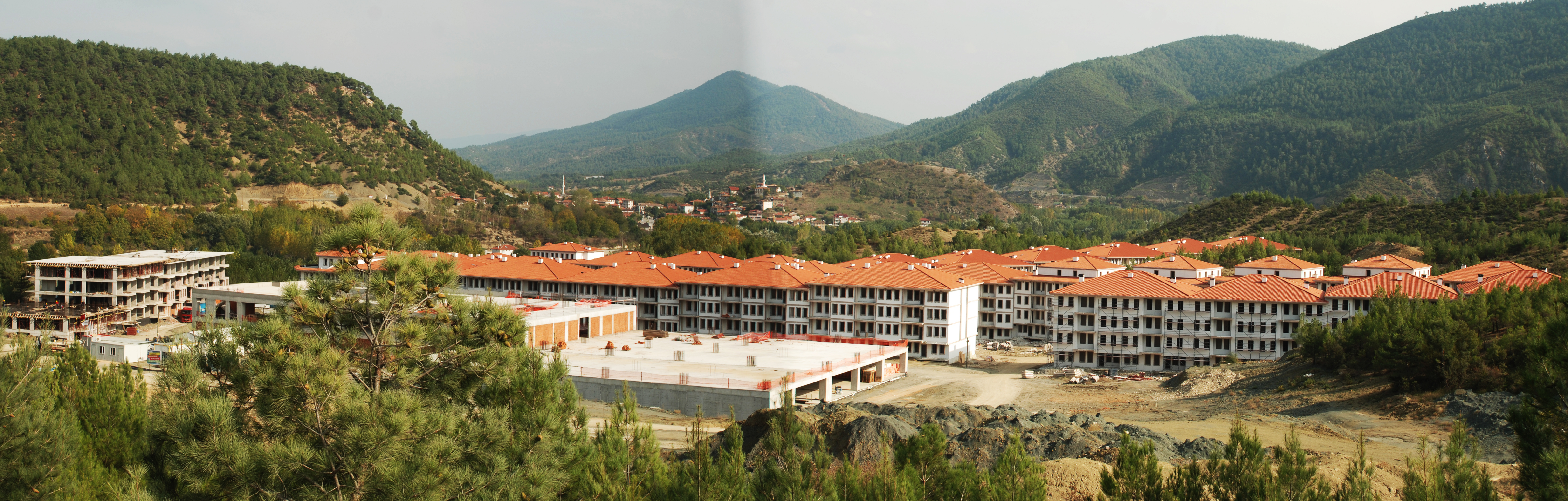 Sakarya ili, Taraklı ilçesinde yapılmakta olan termal tesisler.